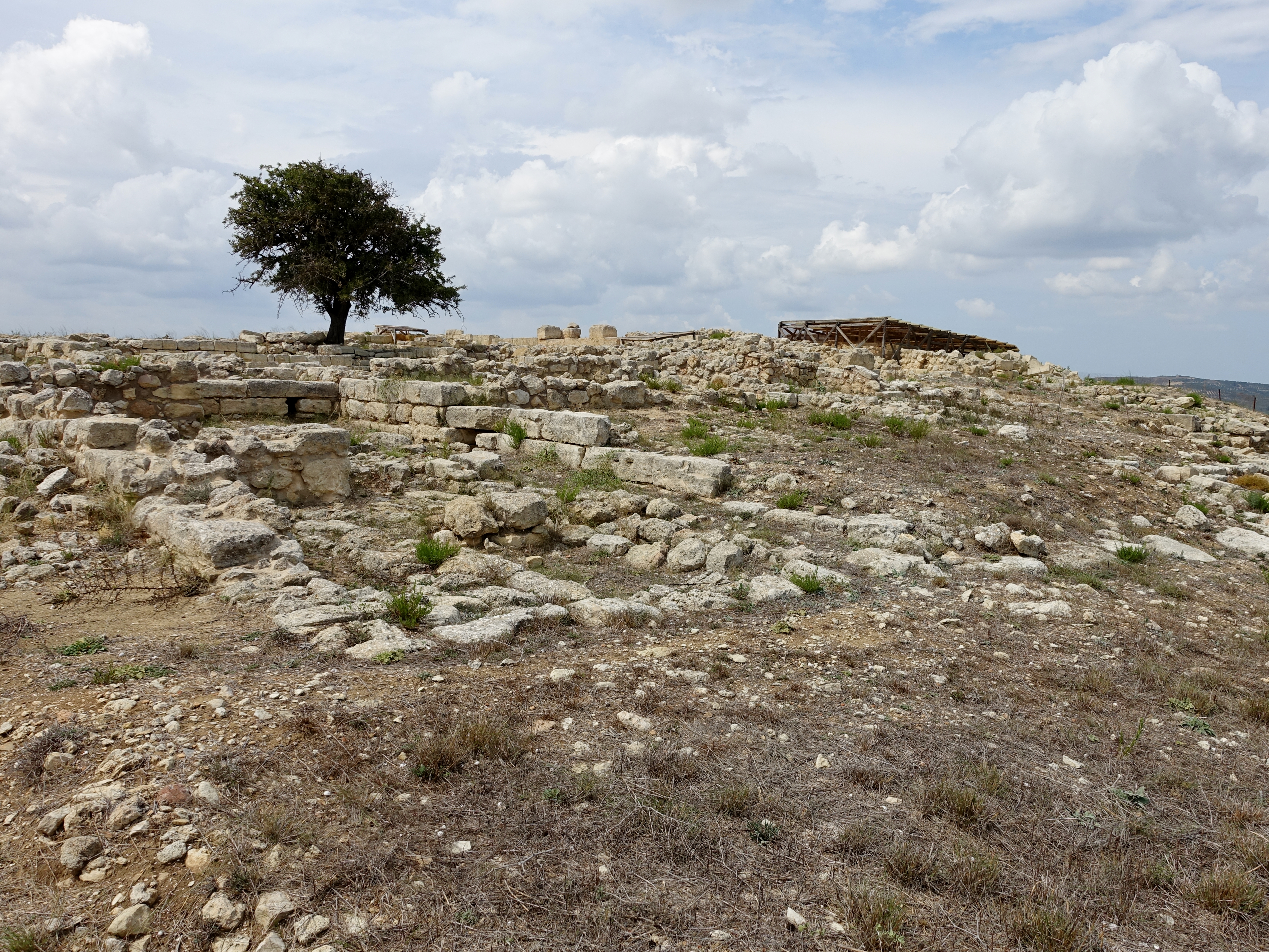 Palast von Galatas (Μινωικό Ανάκτορο του Γαλατά) nordwestlich von Arkalochori (Αρκαλοχώρι), Gemeinde Minoa Pediada, Kreta, Griechenland